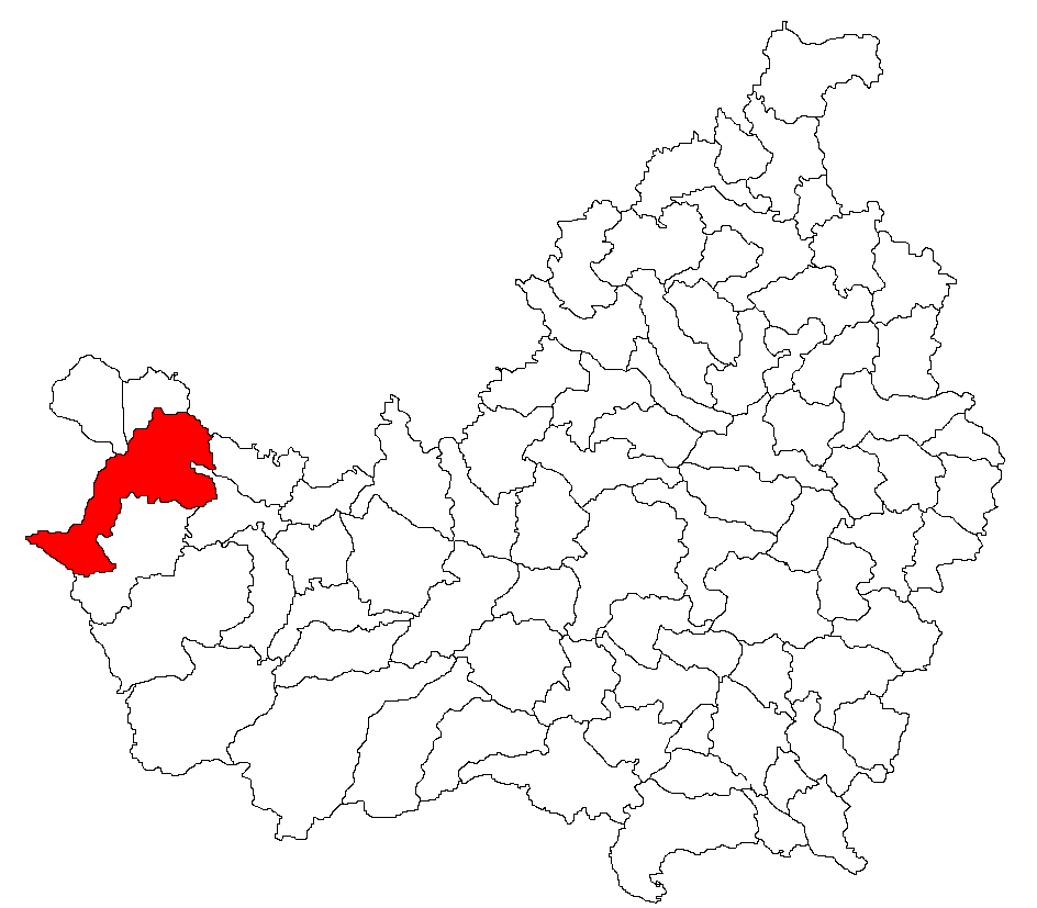 Categorie:Hărţi ale judeţului Cluj